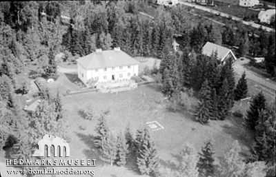 Flyfoto av Hamarhus